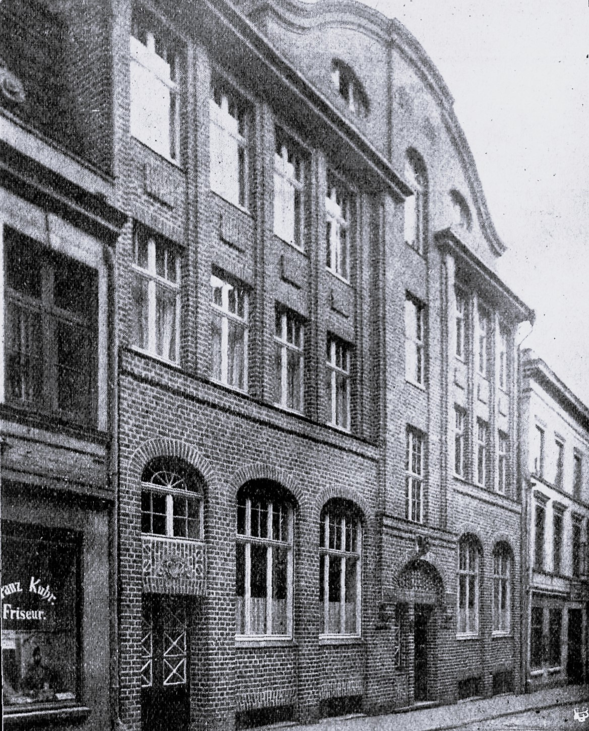 Hermberg'sches Haus in Lübeck, Johannisstraße 23 (Dr.-Julius-Leber-Straße 23), erbaut 1911 durch die Architekten Carl Hahn und Alfred Runge